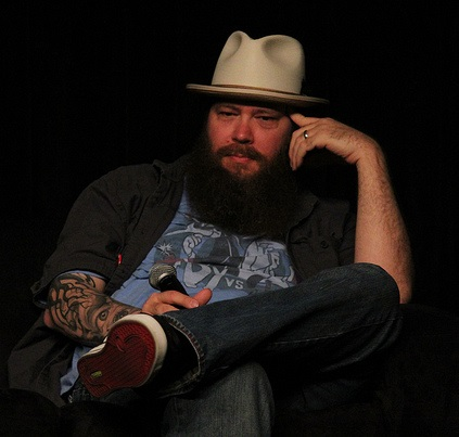 Il fumettista Jason Aaron ad una convention sul fumetto